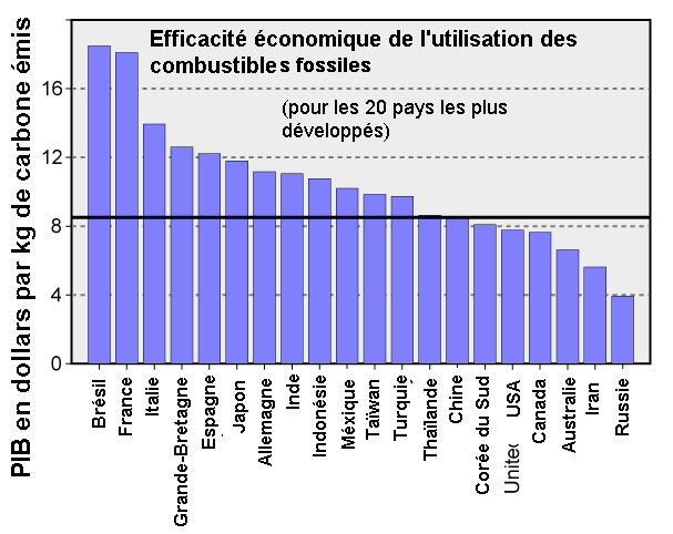 Fossil_Fuel_Efficiency fr